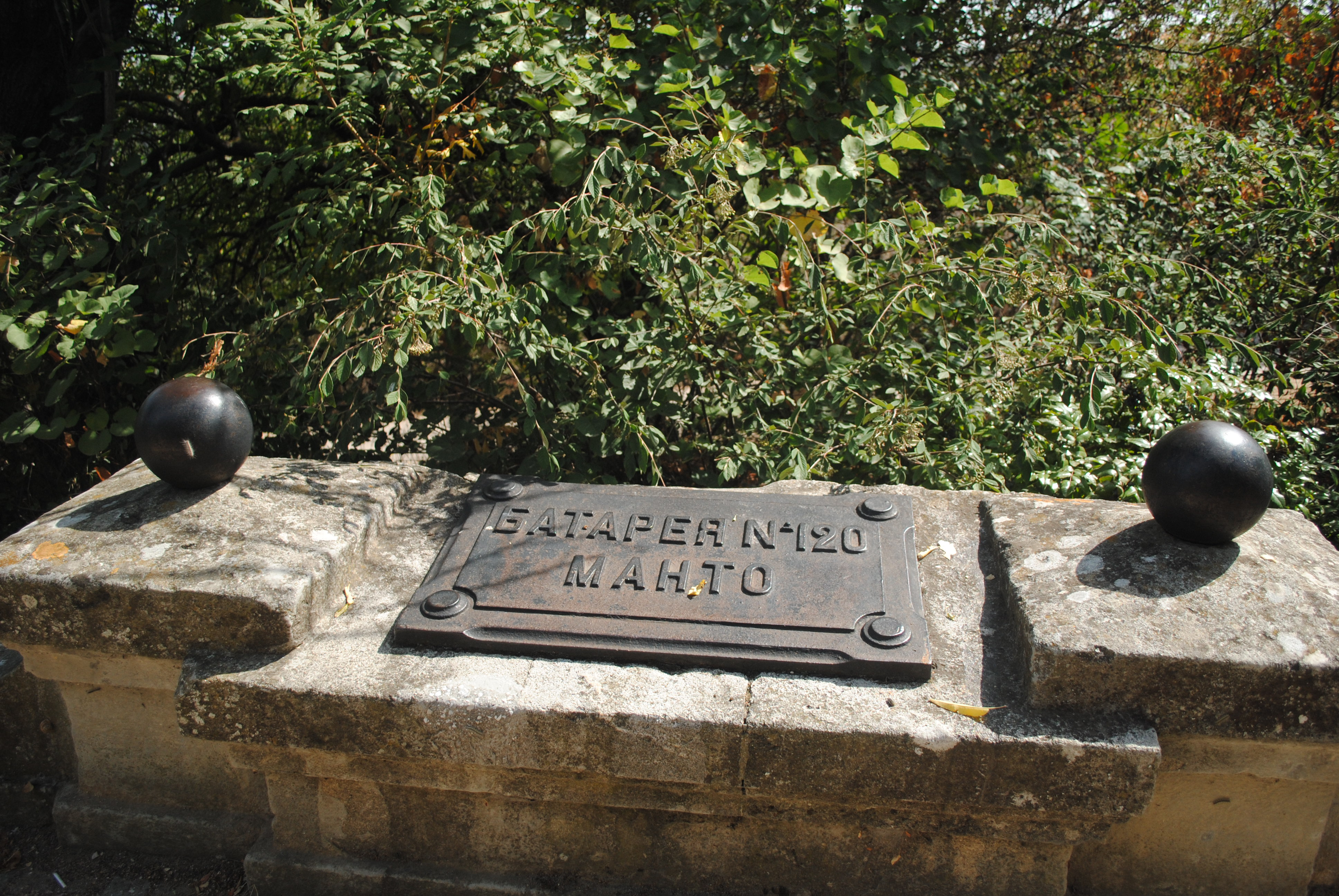 Памятное место батареи № 120 Манто: бульвар Исторический, Ленинский район, Севастополь This object is located on the Crimean Peninsula and recognized as cultural heritage by both Russia and Ukraine under the monument ID: 9230108009/ 85-366-0082, respectively. The legal status of the Crimean region is currently disputed.